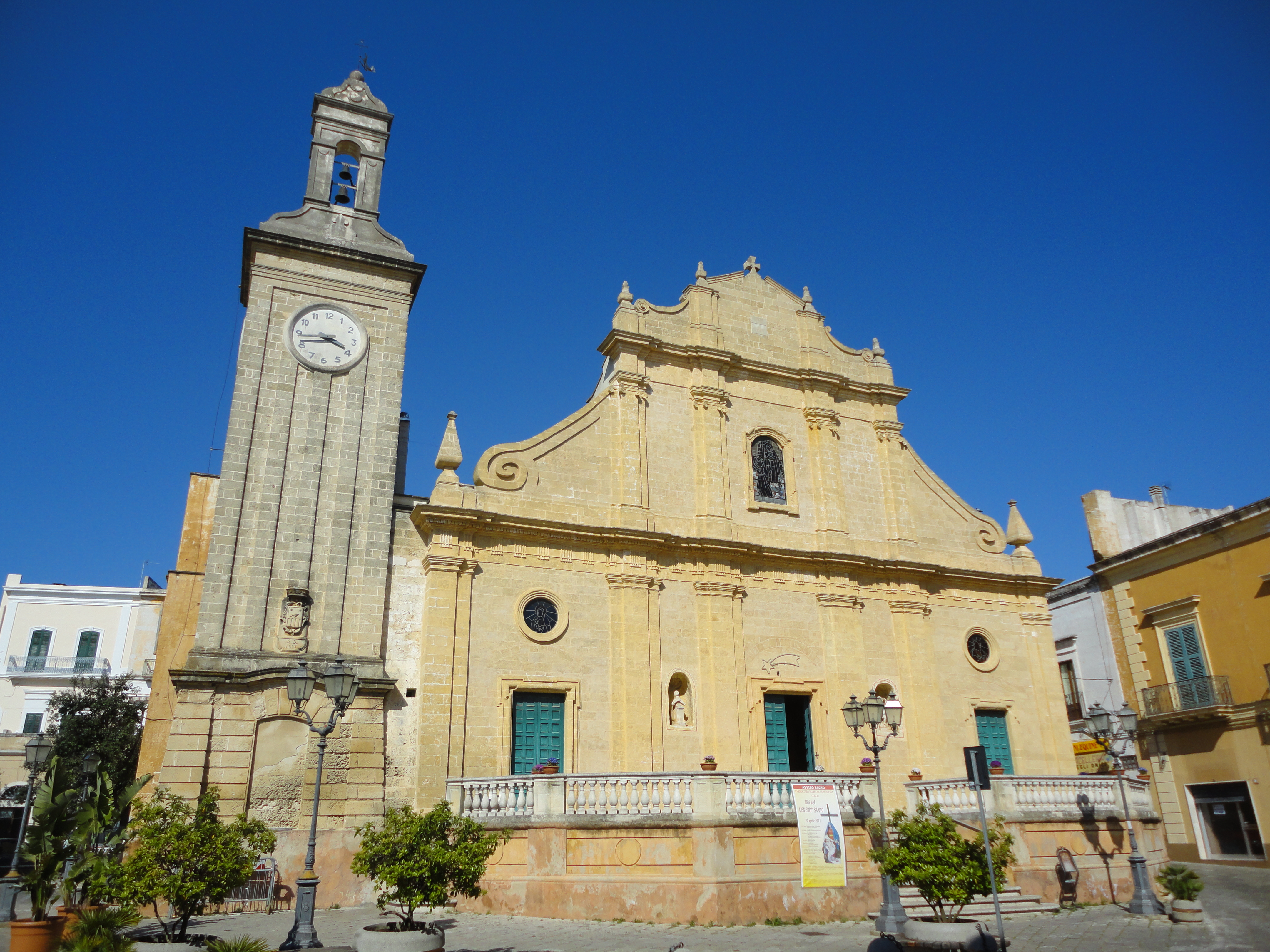 Chiesa dell'Annunziata di Tuglie, Lecce